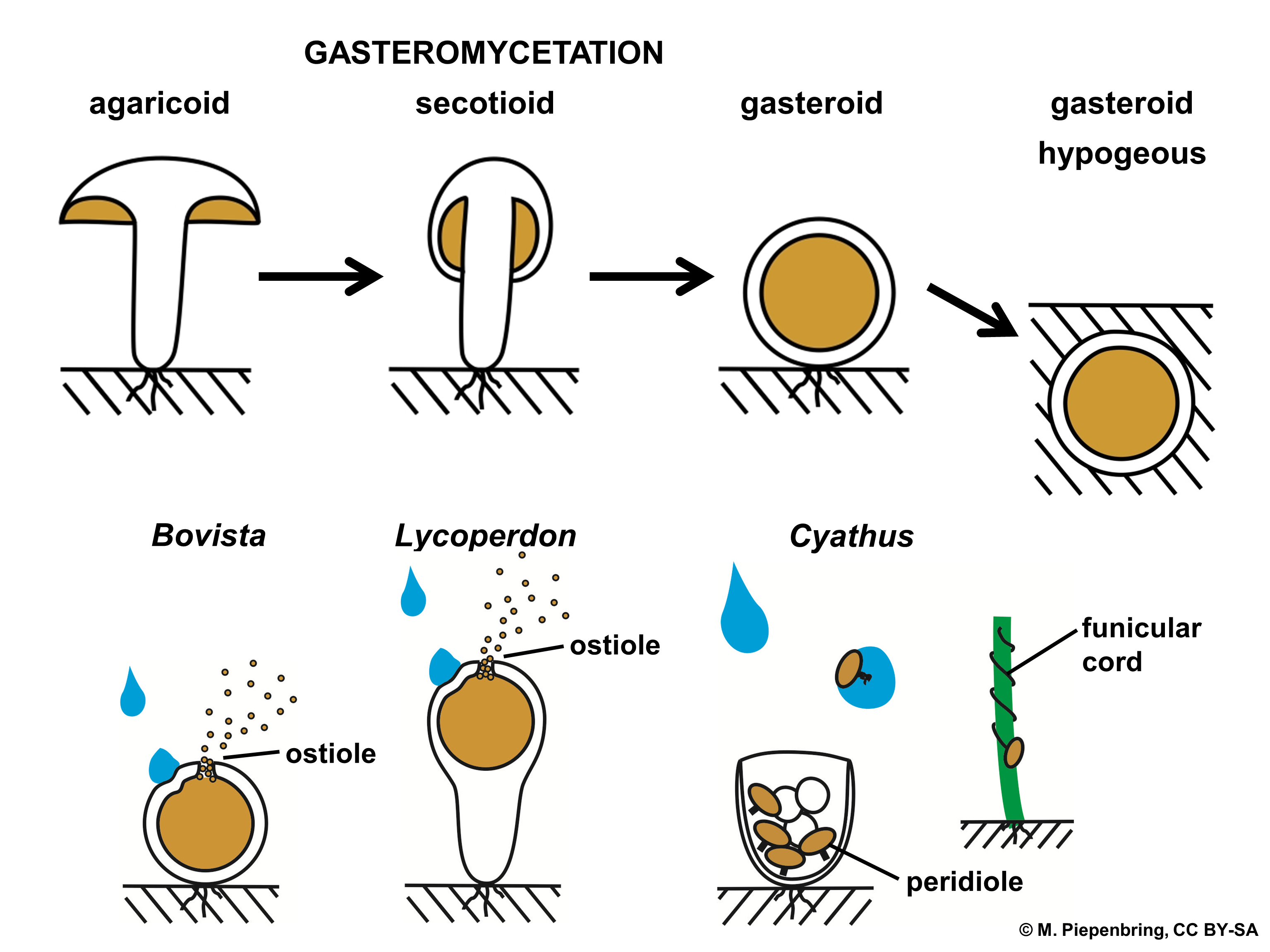 Biologische Schemata, gezeichnet und freigegeben von M. Piepenbring